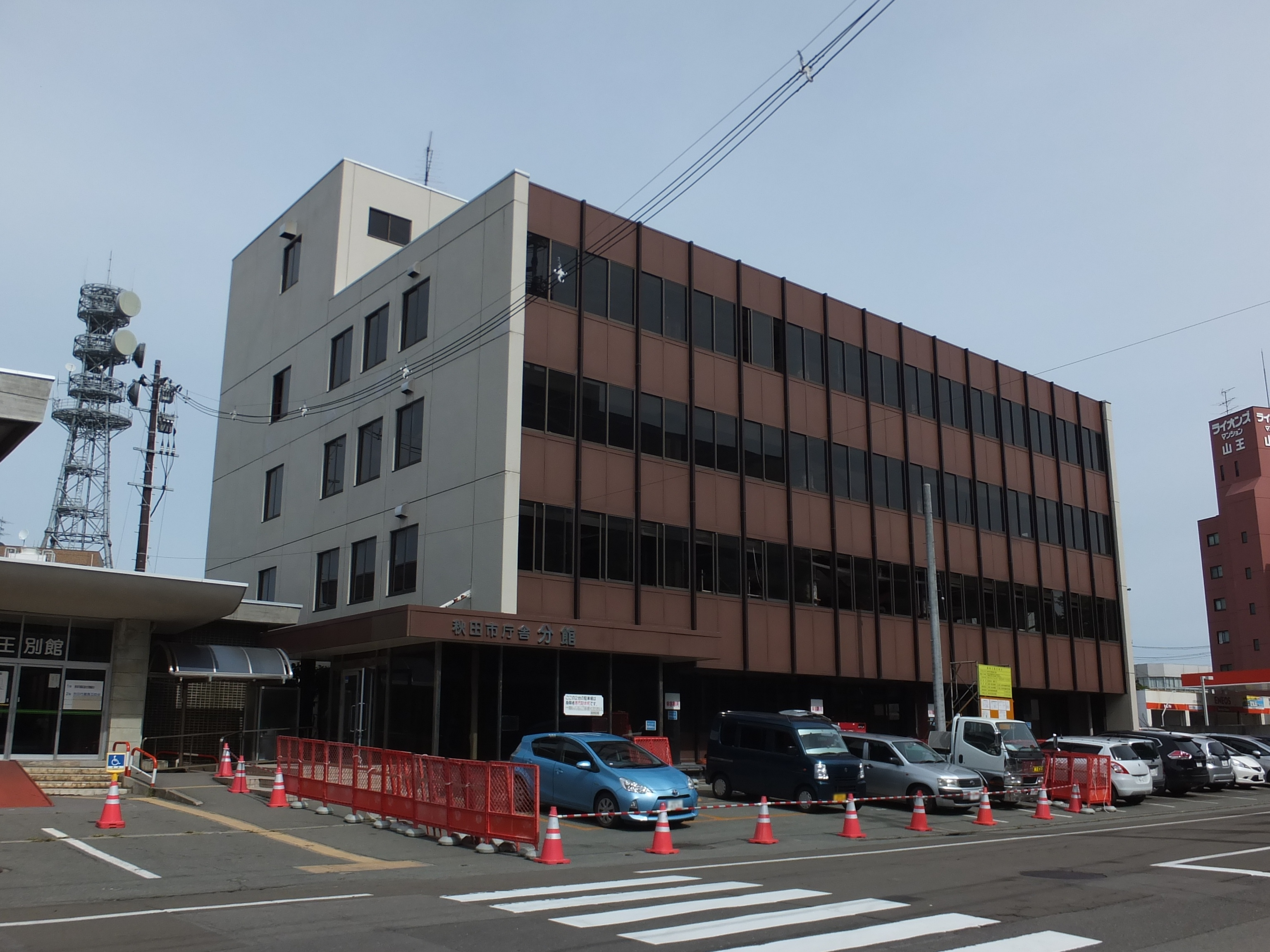 秋田市役所分館（秋田市山王）